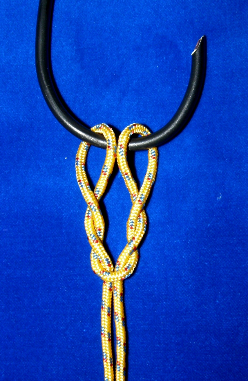 Kurze Trompete-Knoten